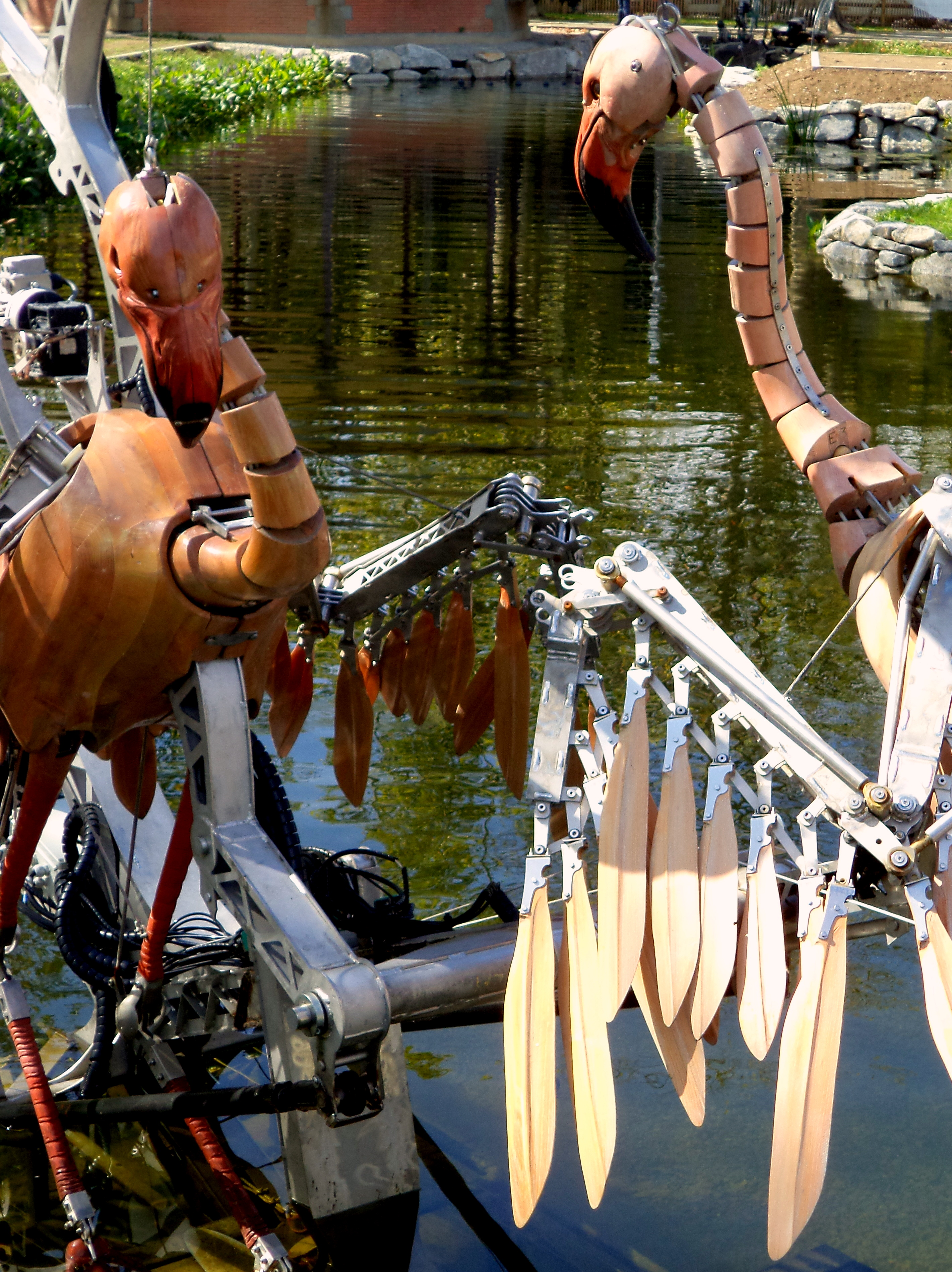 Création de la compagnie La Machine; Photo visible également sur Flickr (ChevillonW)